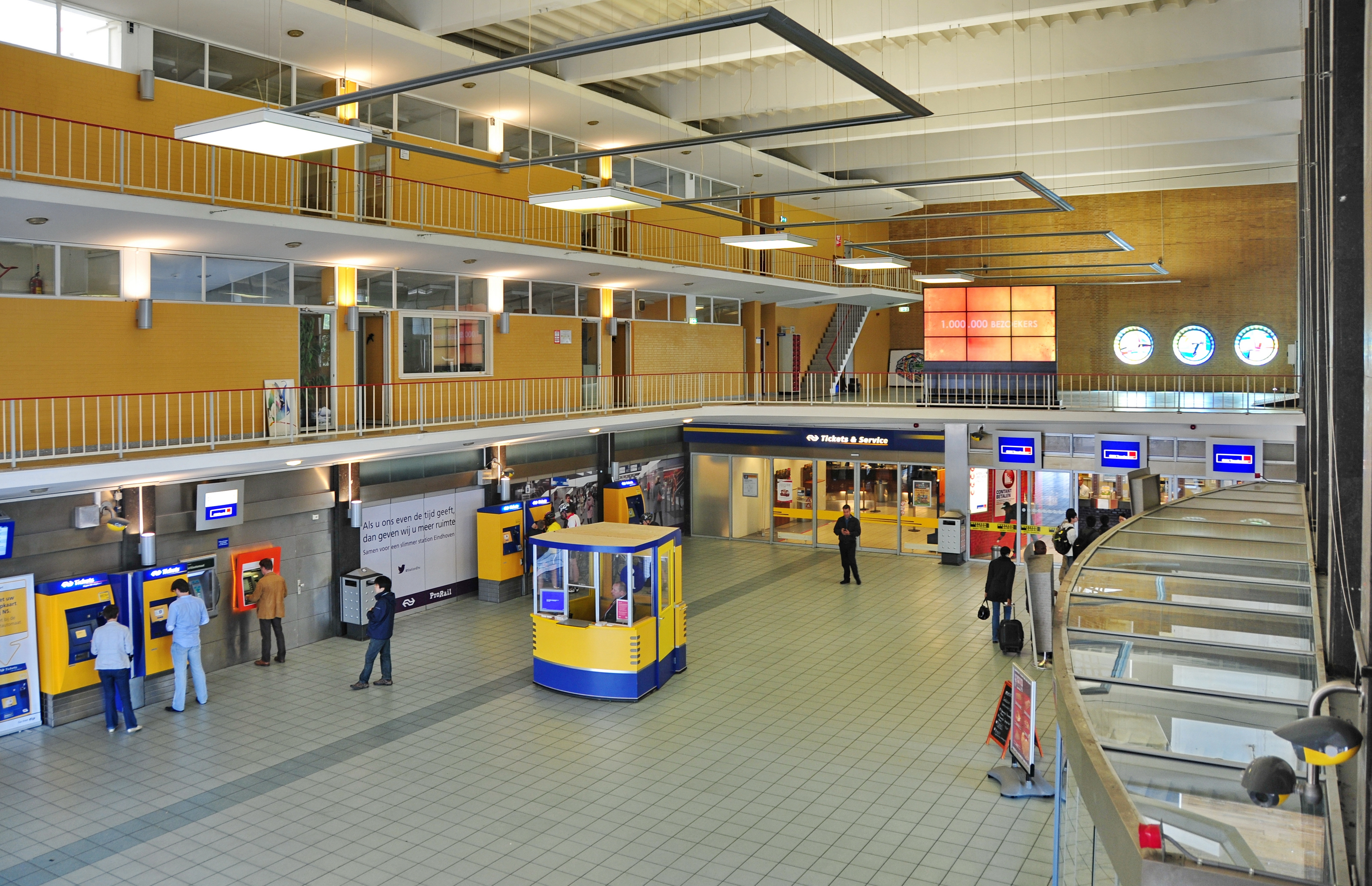 Eindhoven, Niederlande, 2013